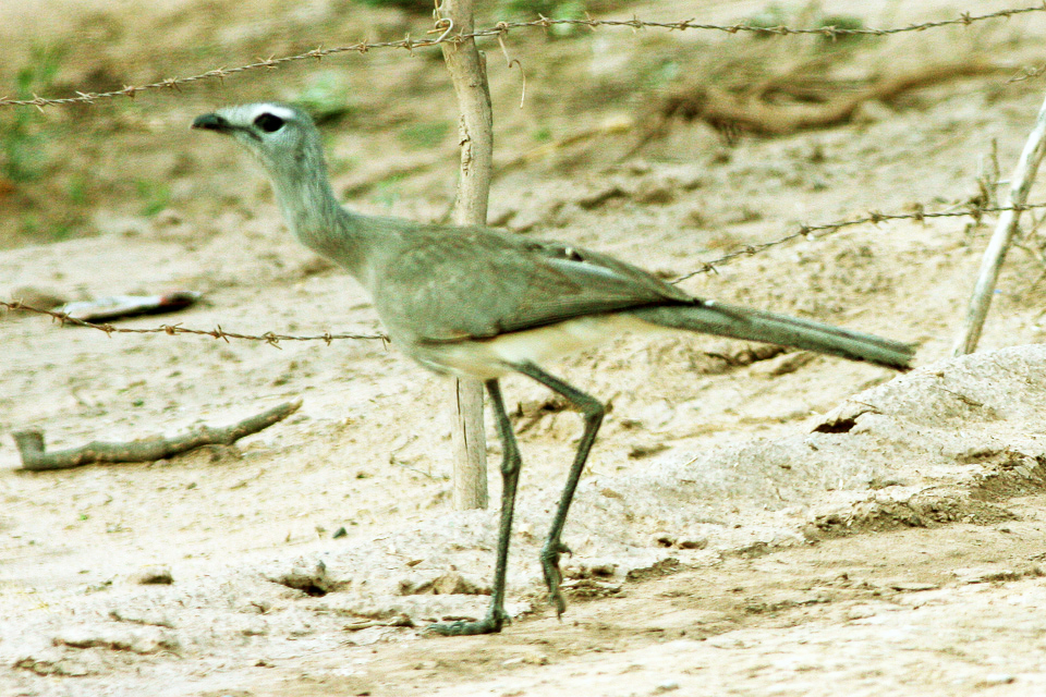 Las Lajites to Machagai Gran Chaco